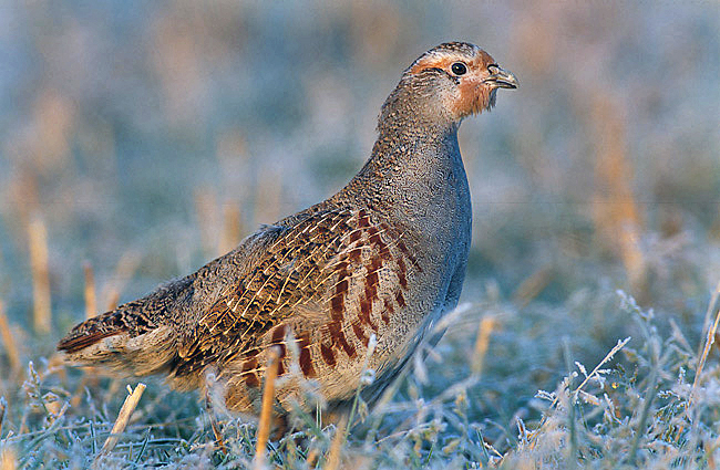 Perdix perdix